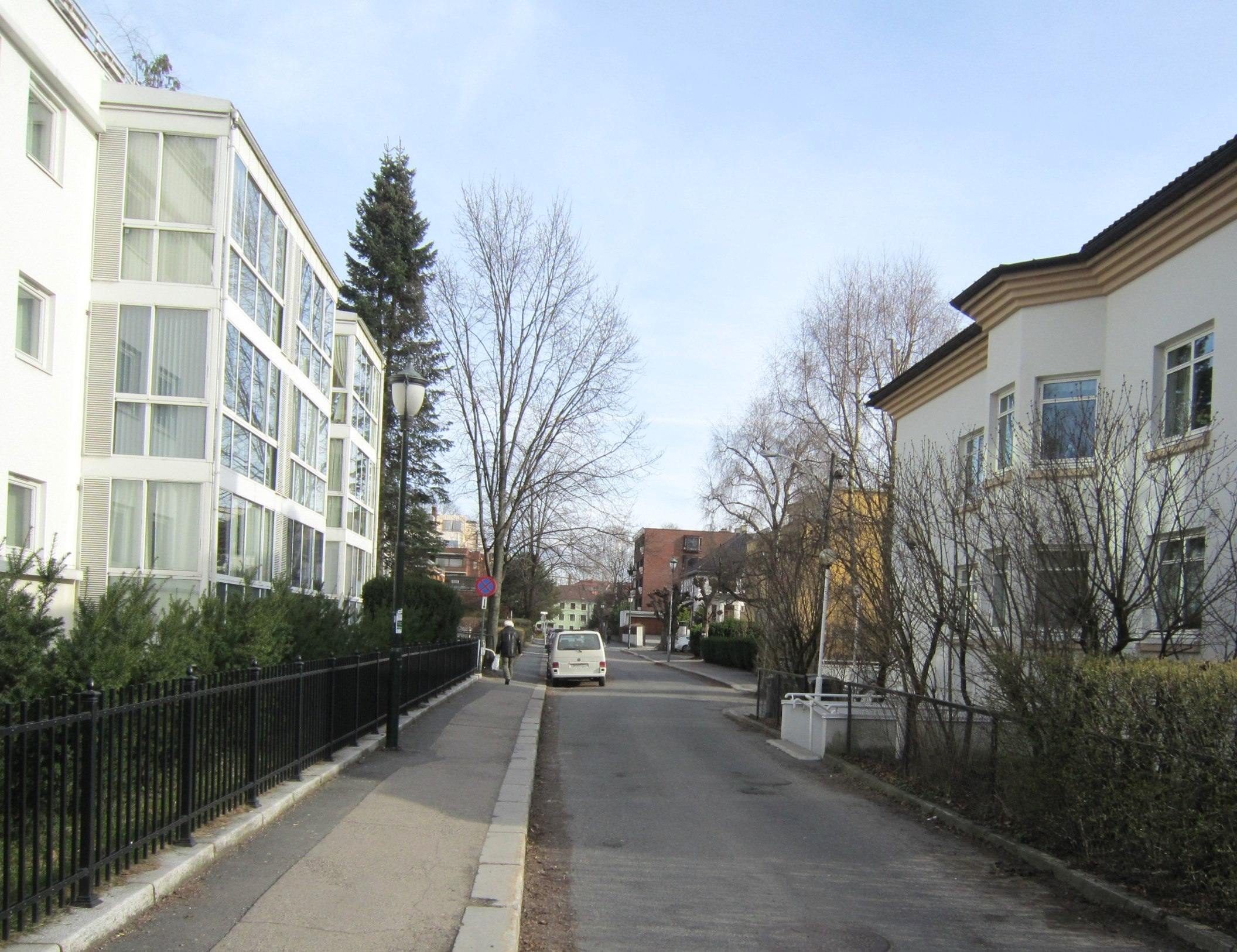 Munthes gate i Oslo